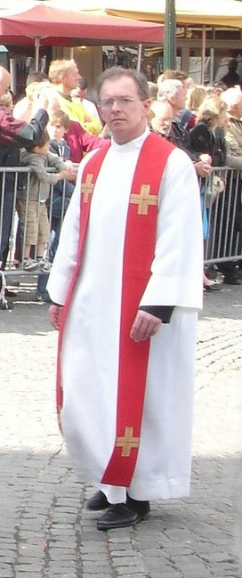 Priest